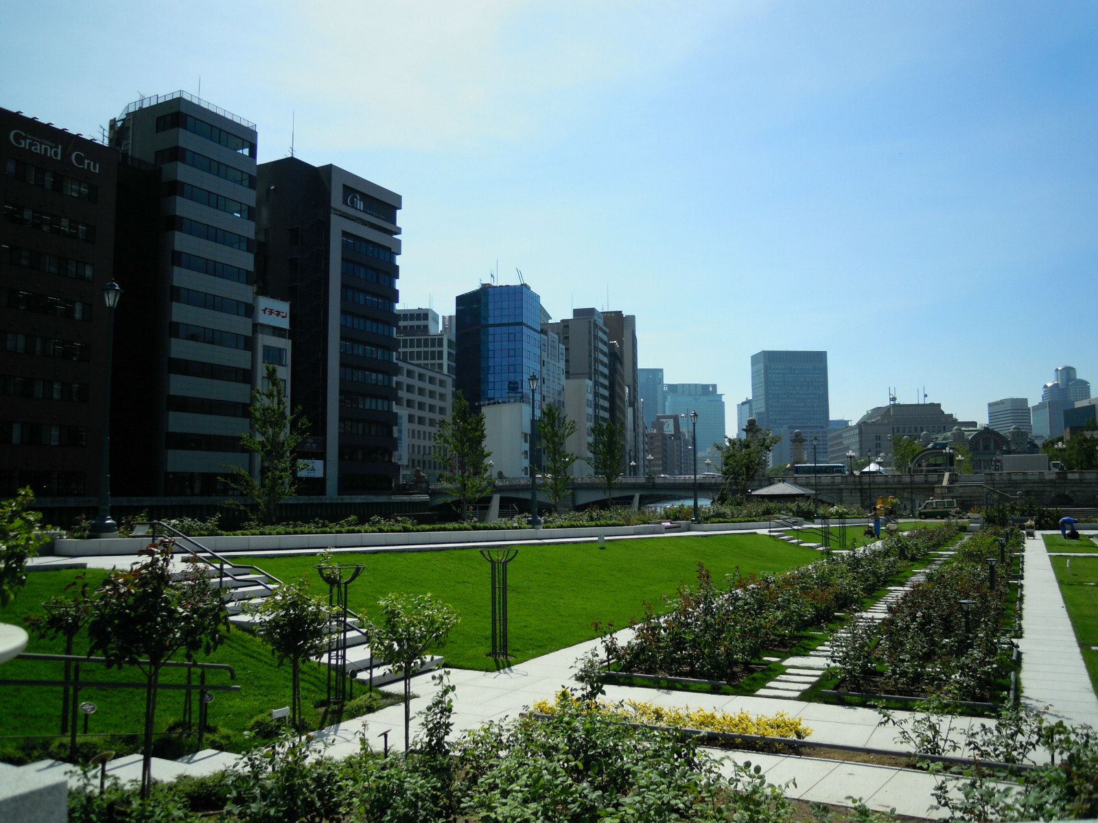 Nakanoshima